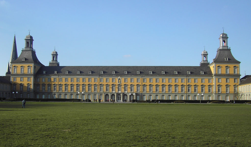 Hauptgebäude der Universität Bonn (ehemaliges kurfürstliches Schloss)